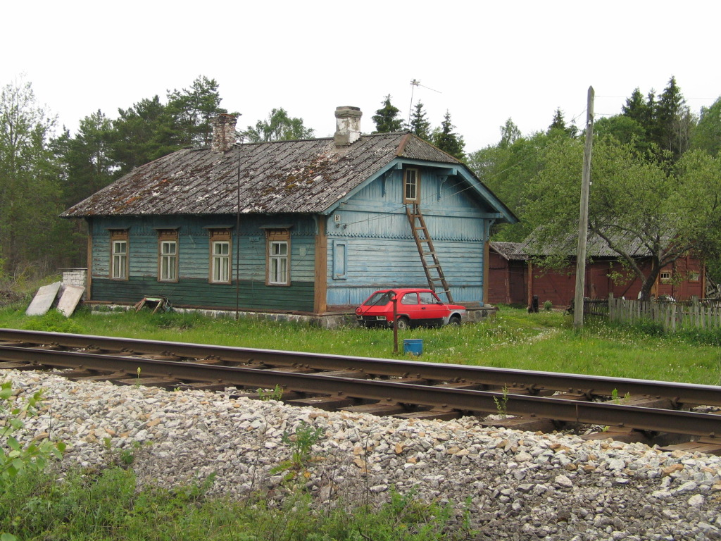 Laitse jaama elamu